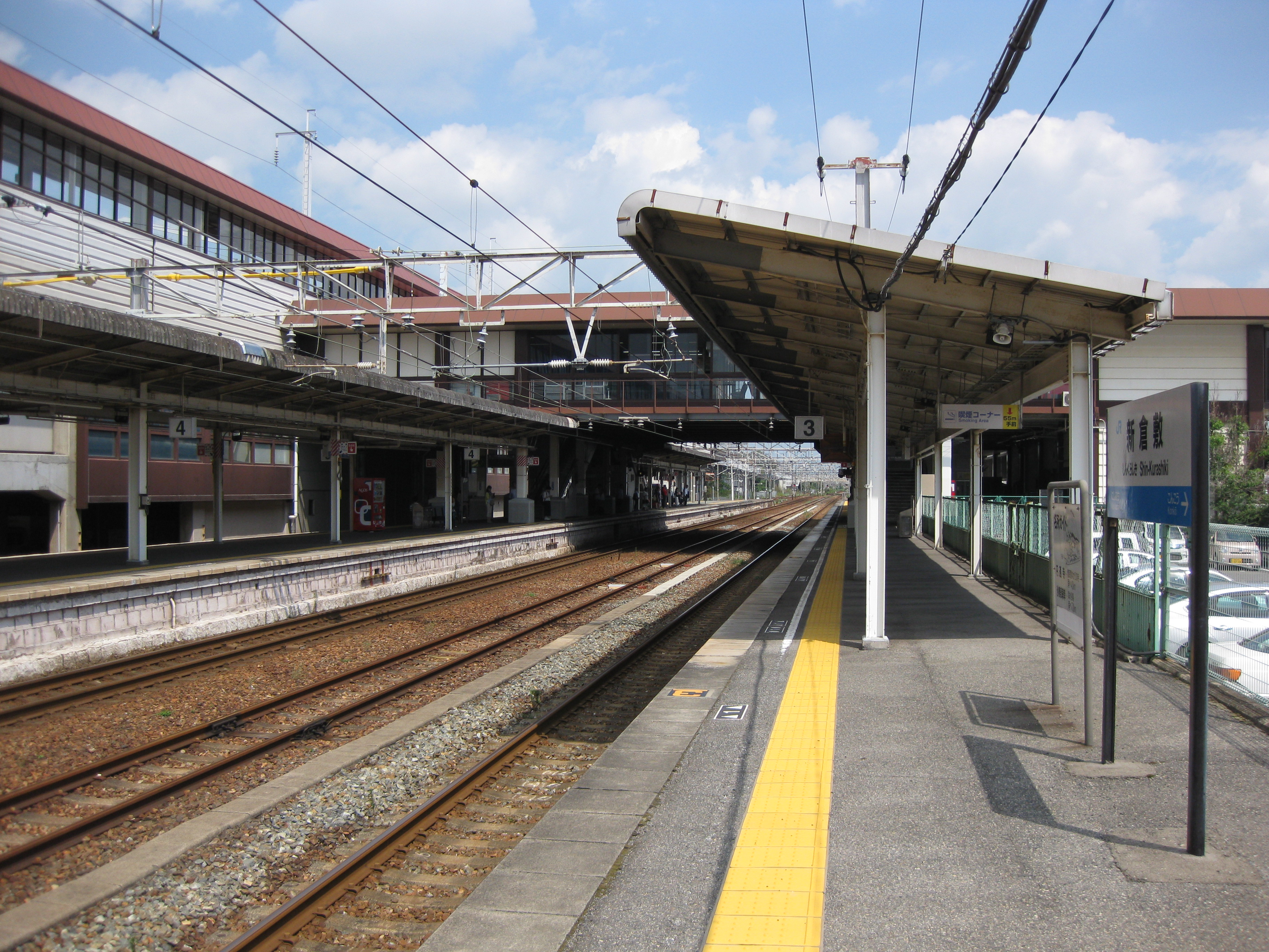 新倉敷駅在来線プラットホーム